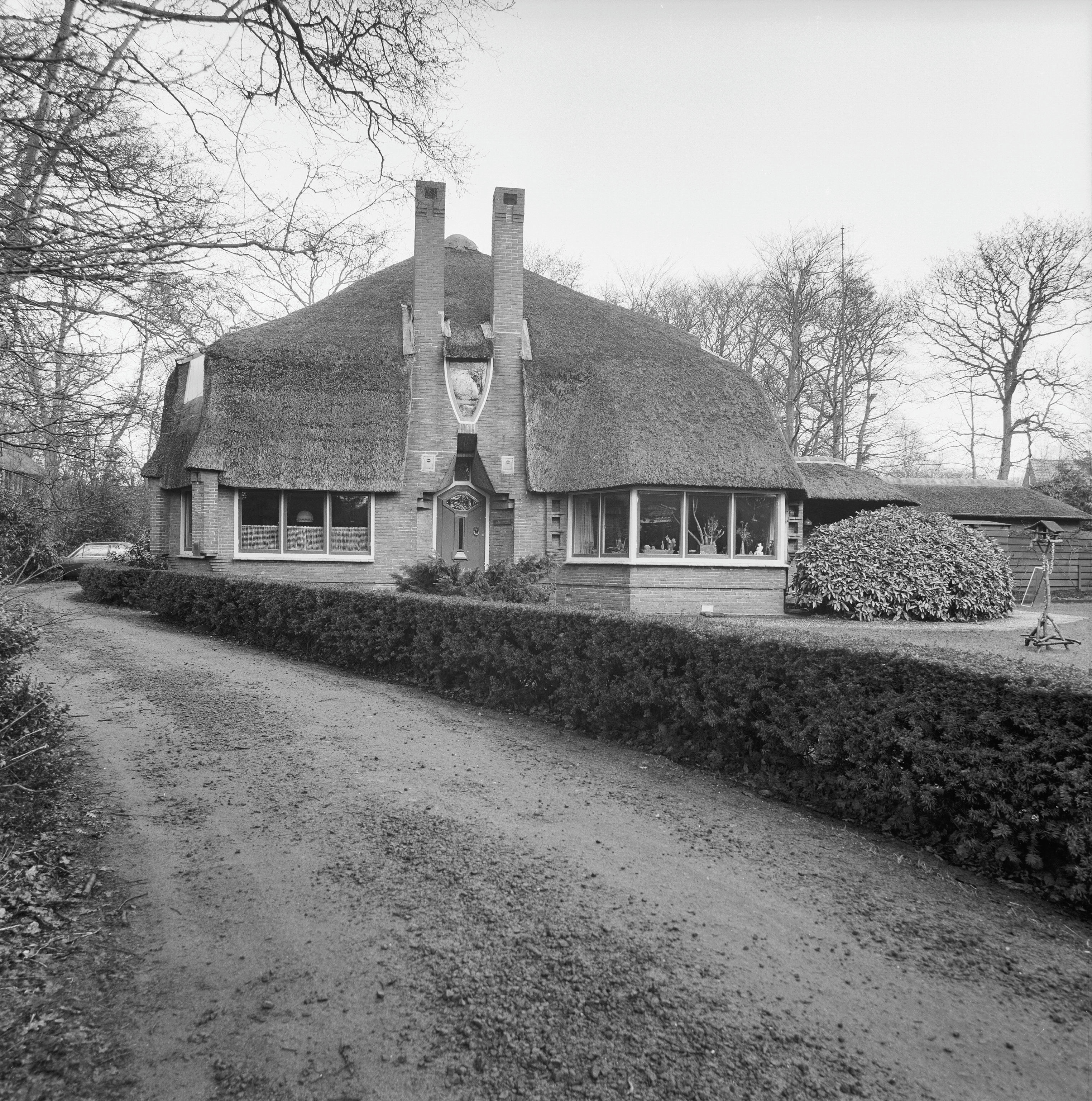 Park Meerwijk: Villa VI, Meerwijklaan 7, M.Kropholler 1918